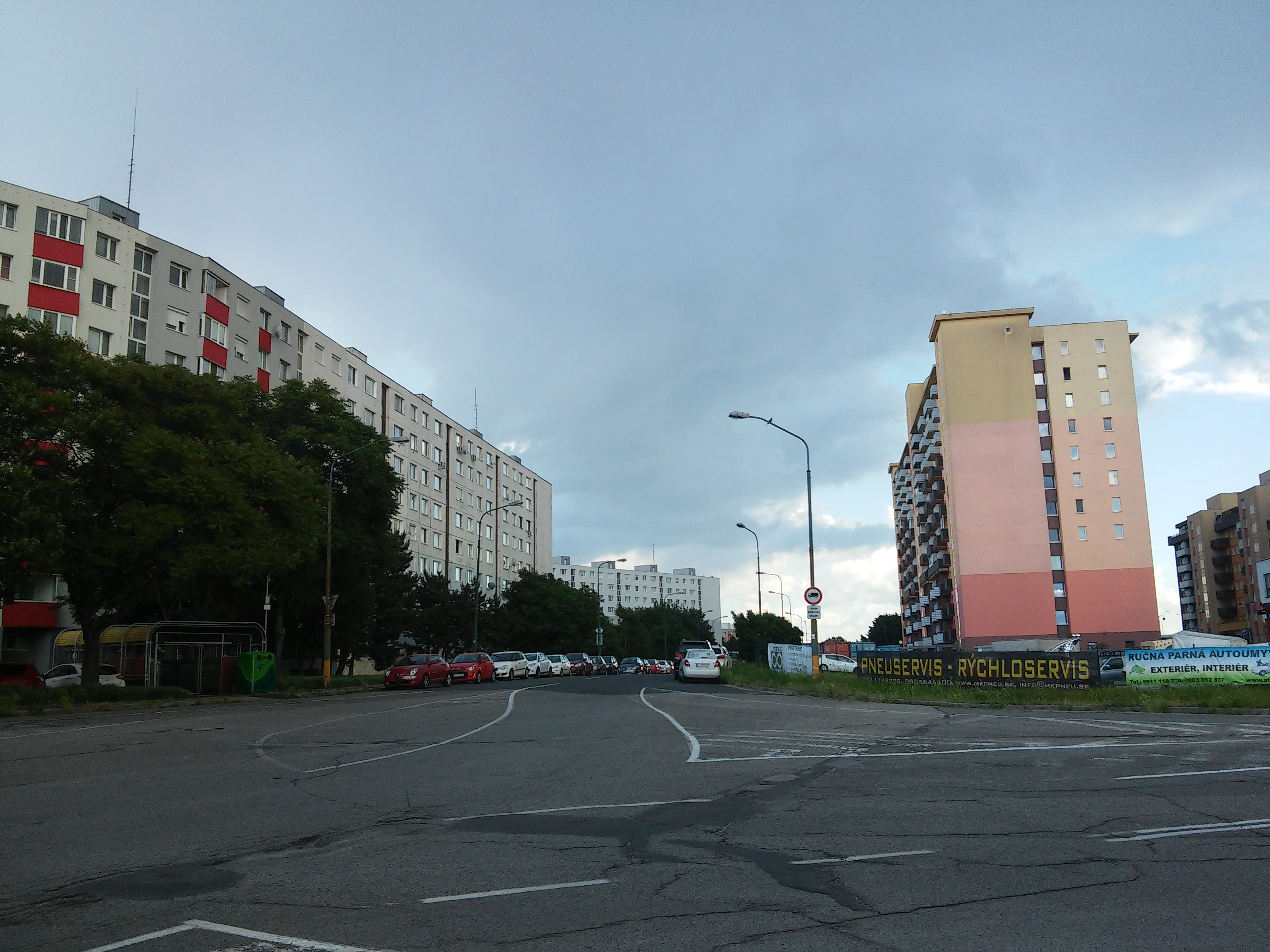 Vyšehradská, Petržalka, Bratislava